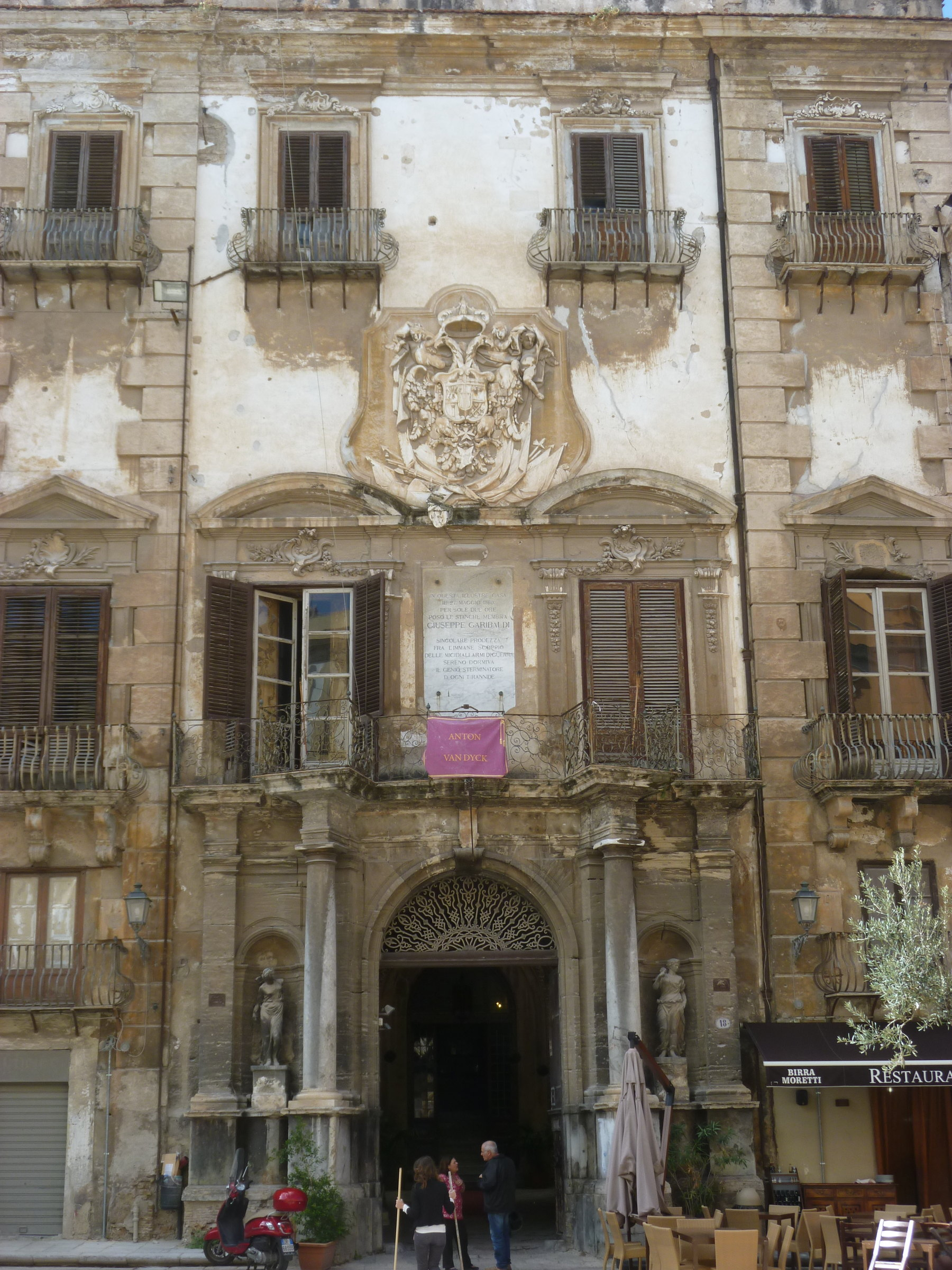 Palermo